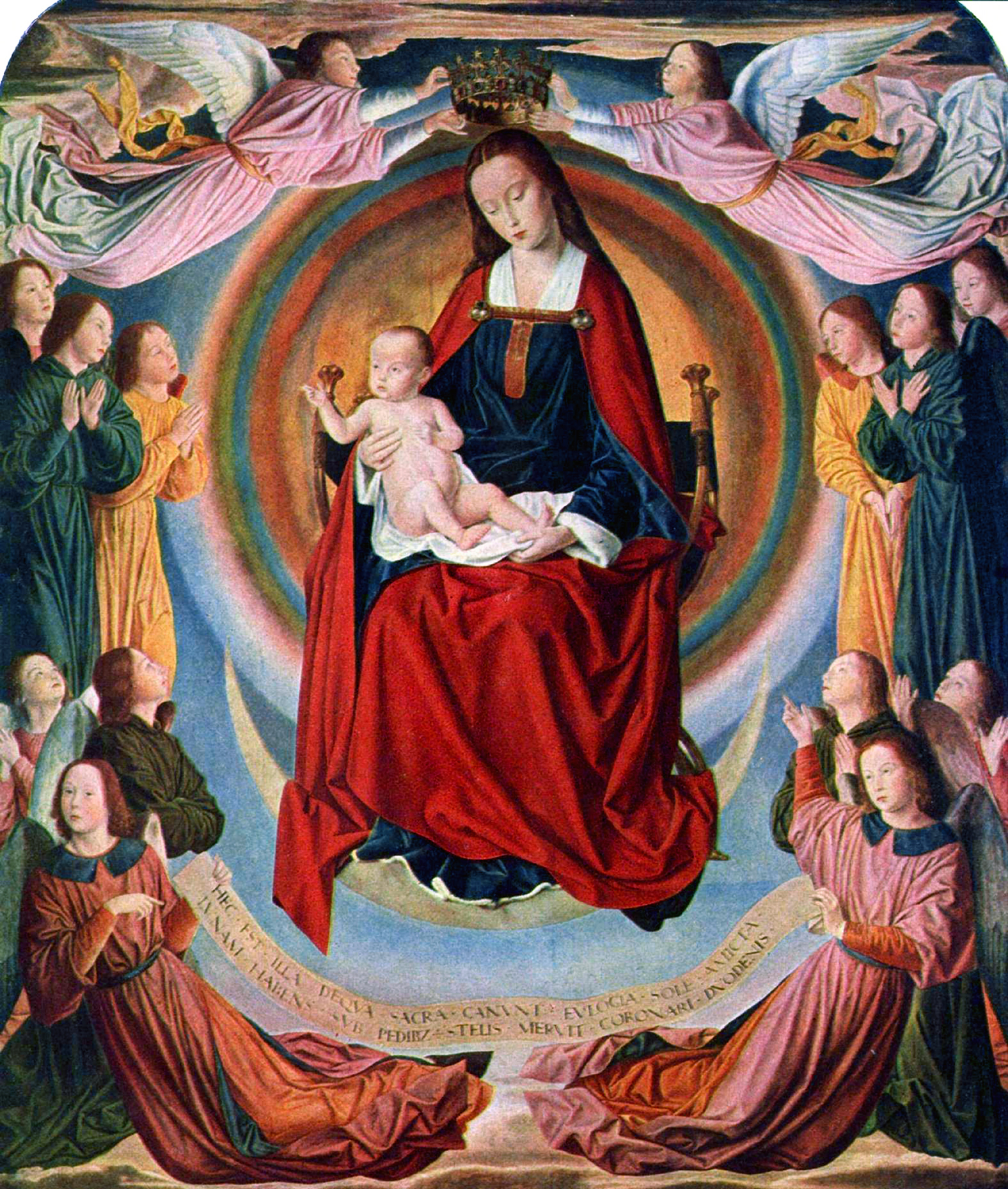 zene: Maria in der Glorie und Engel